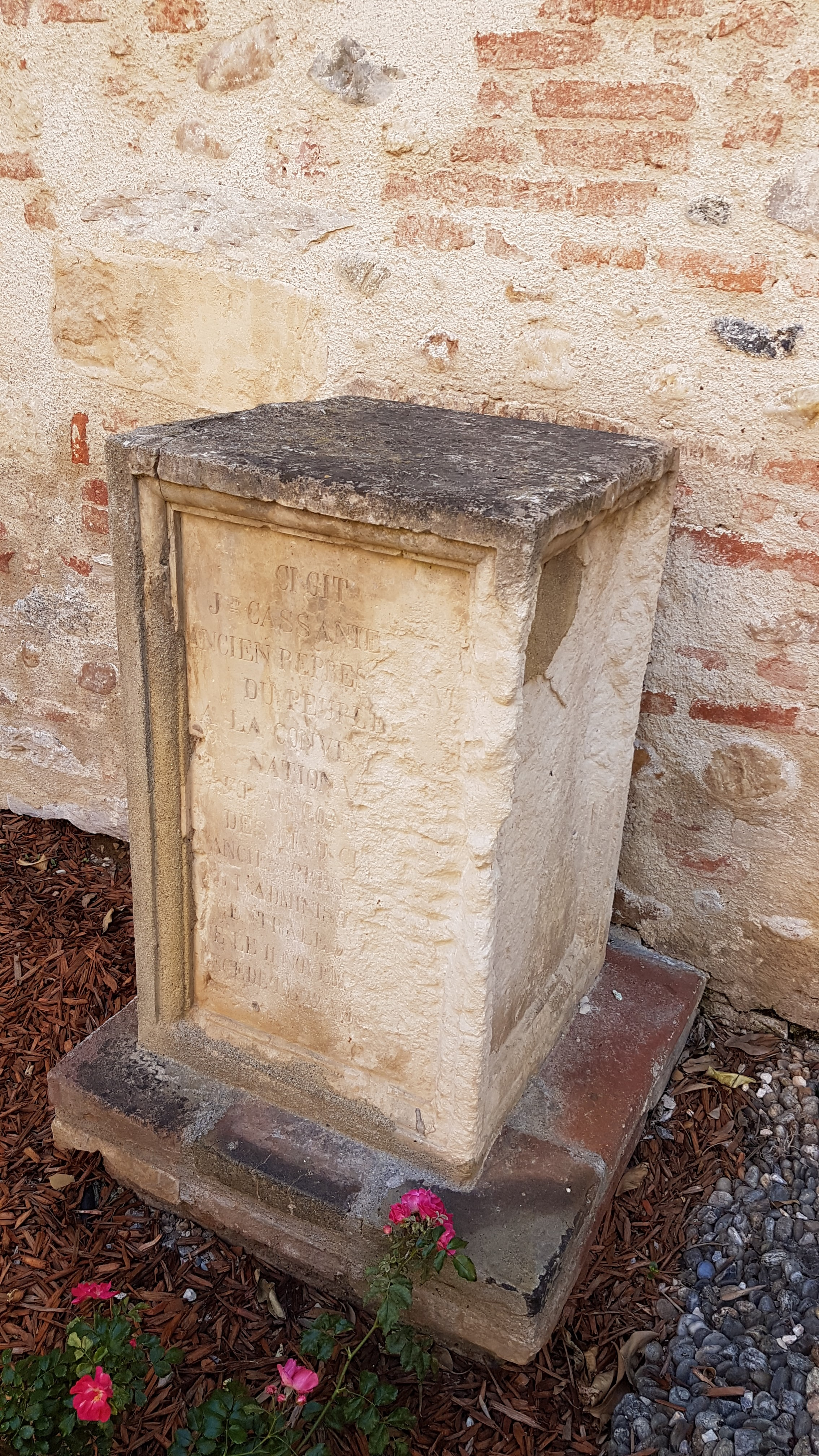 Pierre tombale de Joseph Cassanyes à Canet-en-Roussillon